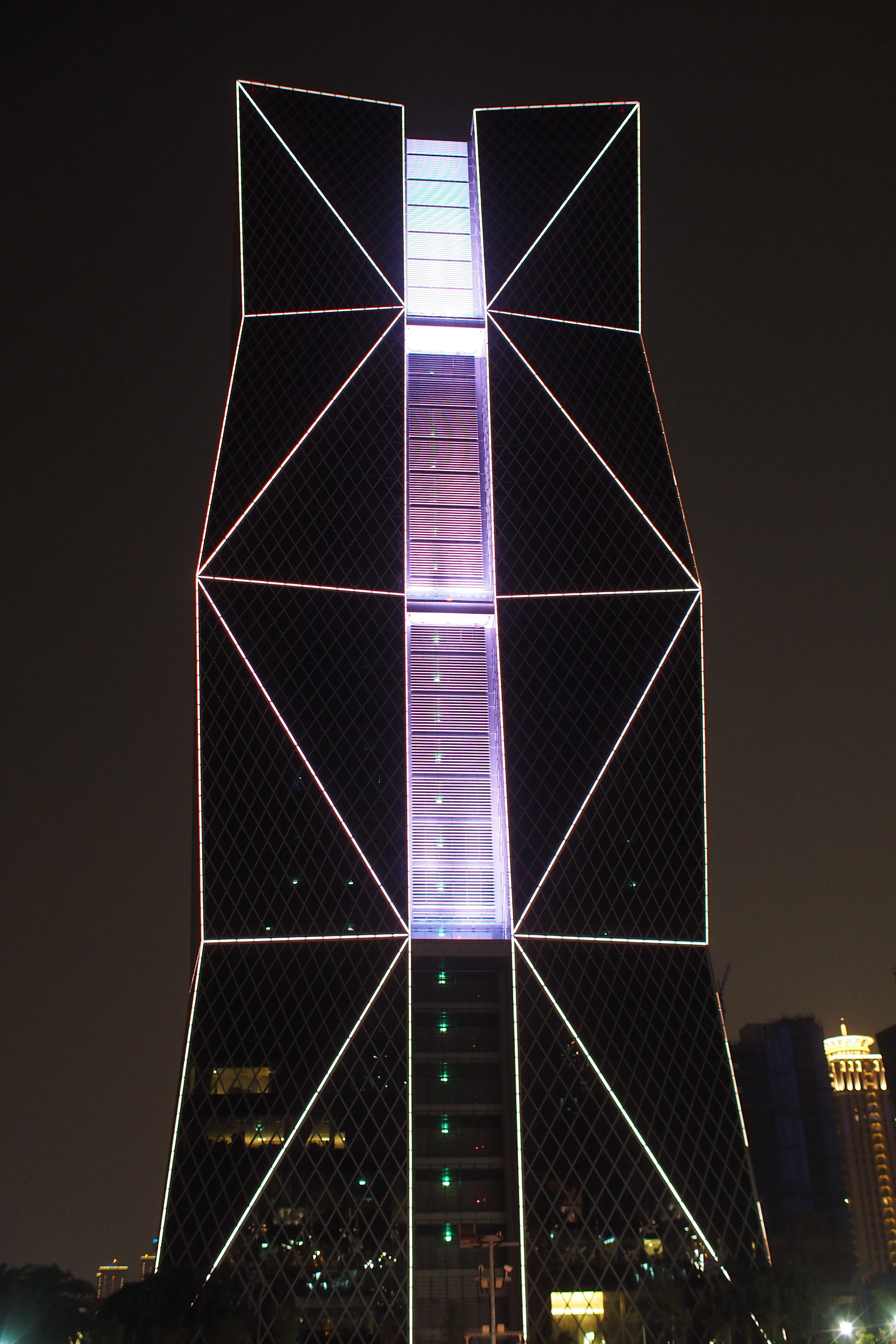 中鋼集團總部大樓夜景。